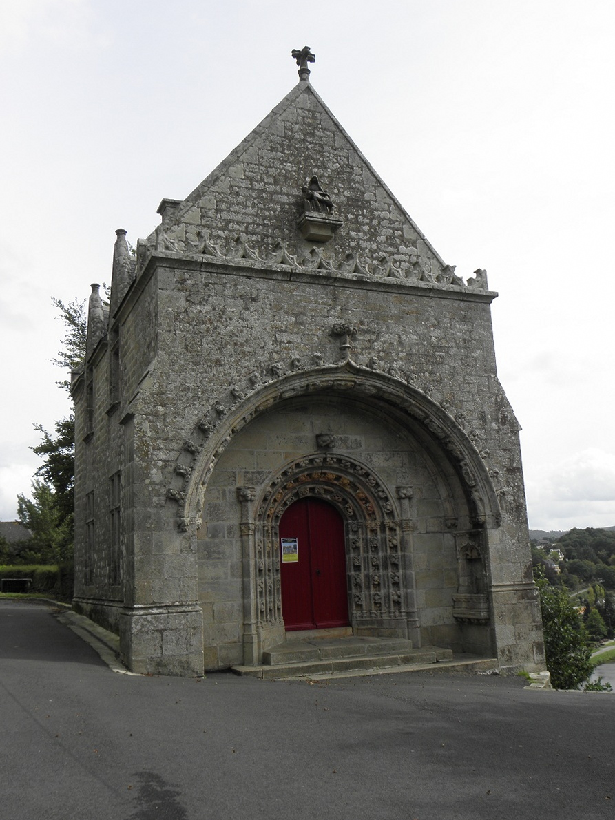 Châteauneuf-du-Faou (29). Site de Notre-Dame-des-Portes. Portail de l'ancienne chapelle.